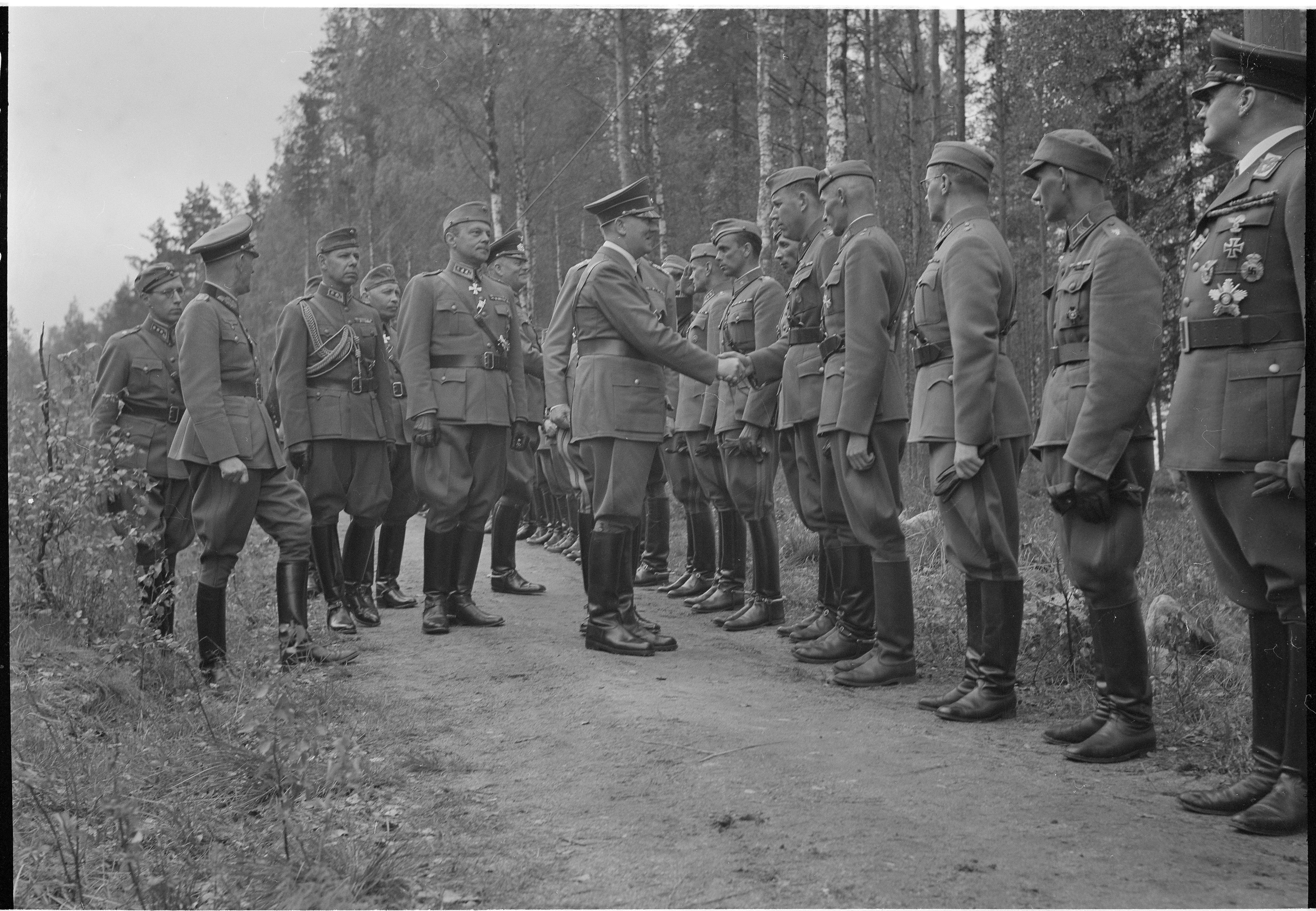 Adolf Hitlerin vierailu marsalkka Mannerheimin 75-vuotissyntymäpäivillä Viimeisenä suomalaisten rivistössä tervehtimisvuoroaan odottaa kersantti Aarre Voutilainen 4.6.1942